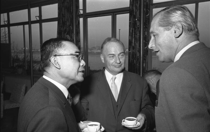 Essen des Ernährungsministers Schwarz im Presseclub für den thailändischen Landwirtschaftsminister und Pressechef Charusreni.